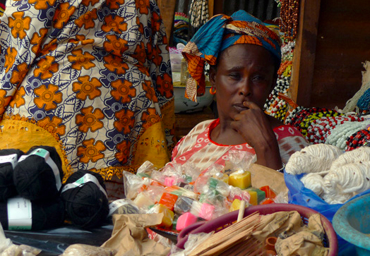 Vendedora en el Albert Market de Banjul